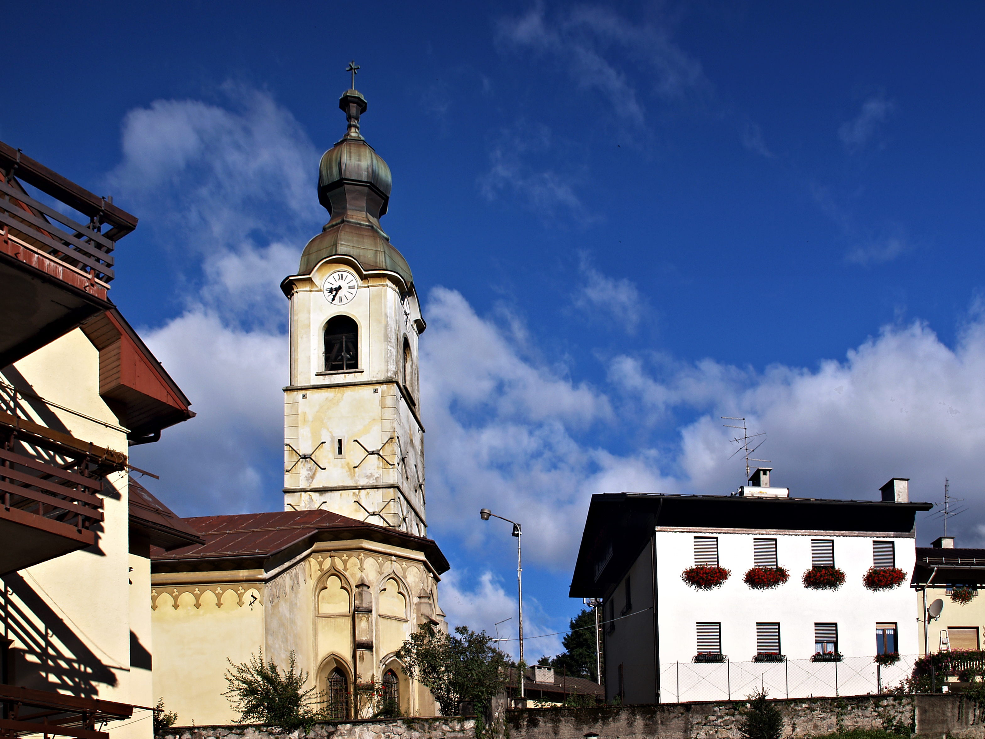 Pontebba, Frioul-Vénétie julienne (Italie) - Église San Giovanni Battista vue depuis la Via Mazzini